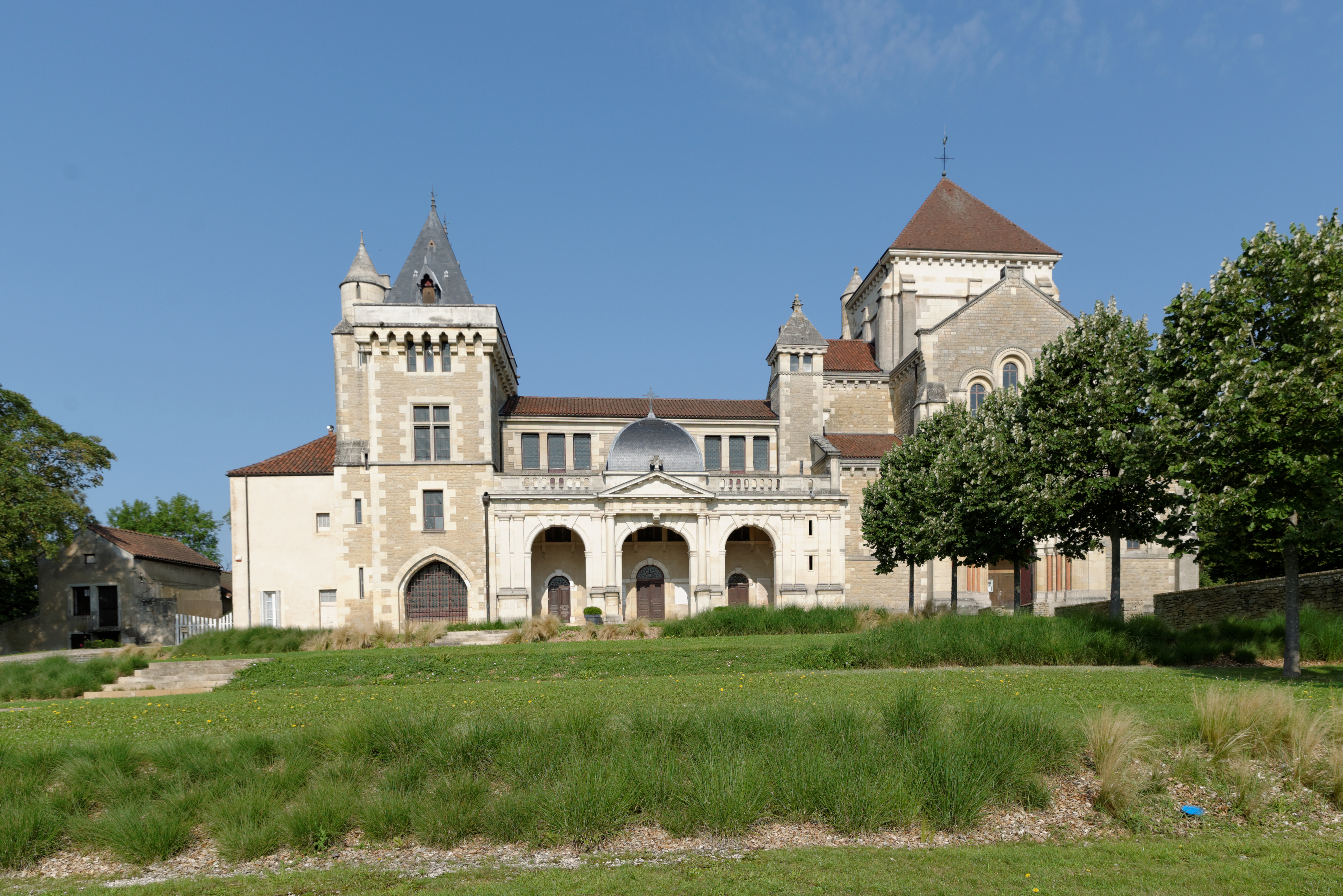 Maison natale de Saint Bernard Fontaine lès Dijon, (Côte d'Or, France).